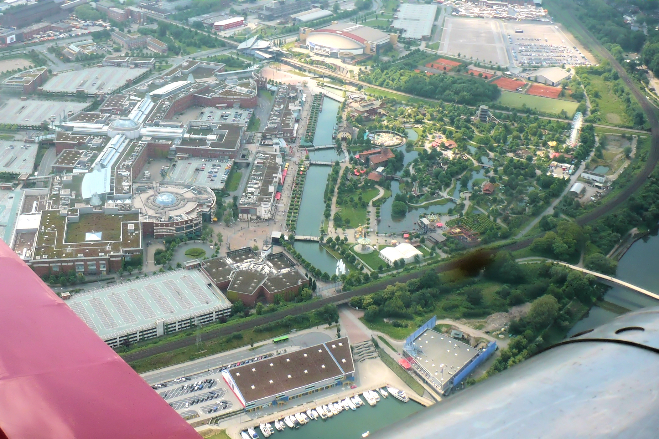 Oberhausen neue Mitte, CentrO, Blick von Nordosten